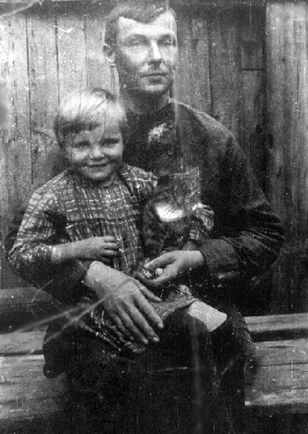 Беларуская (тарашкевіца): Юрка Лістапад з дачкой Нінай, канец 1920-х